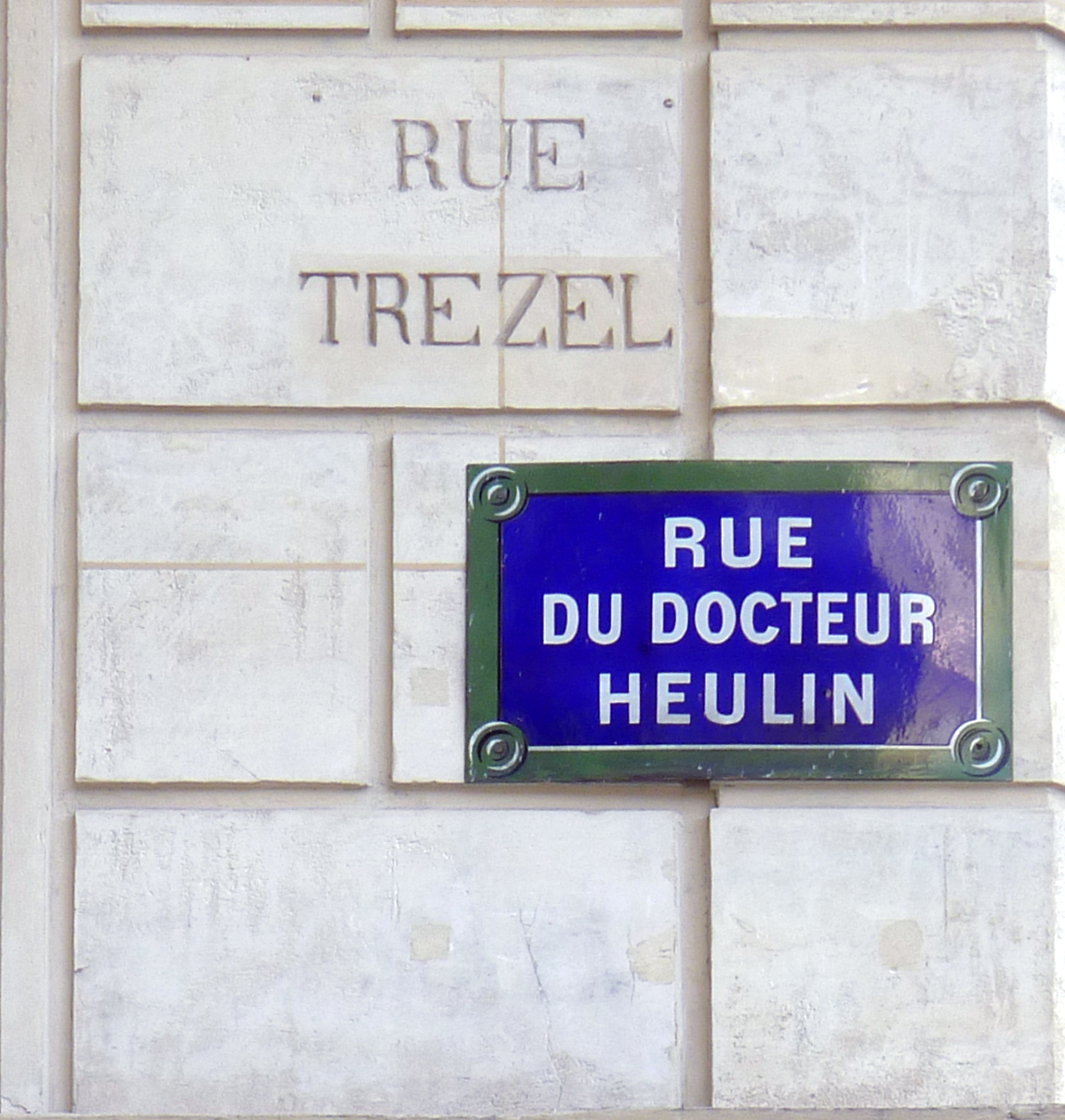 Rue du Docteur-Heulin (plaque actuelle et ancien nom) - Paris XVII